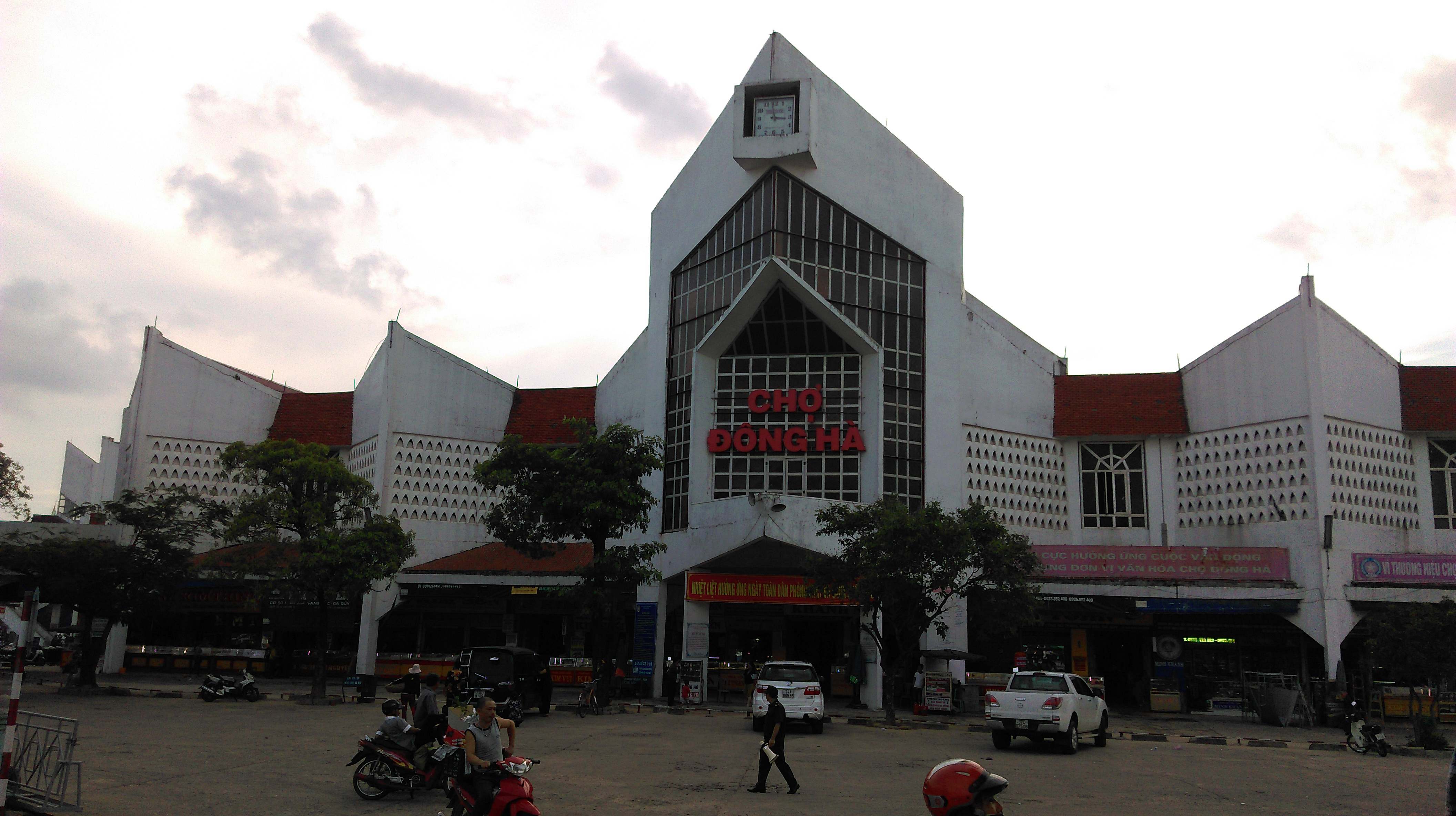 Chợ Đông Hà, Quảng Trị